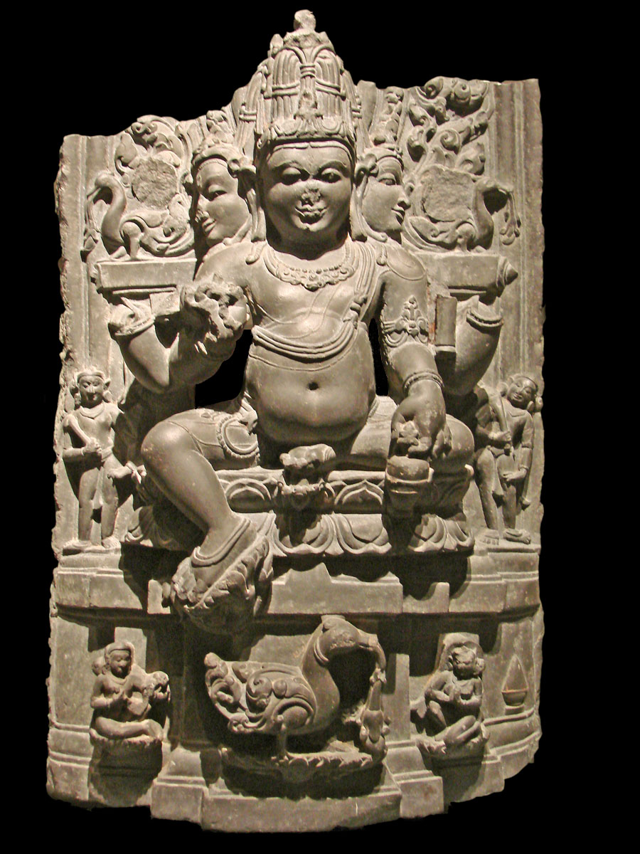 Brahma Bengale (Bengal), 10-11ème siècle après J.C. Schiste 63,0 par 43,0 cm Musée d'"art asiatique (musées de Dahlem) Berlin